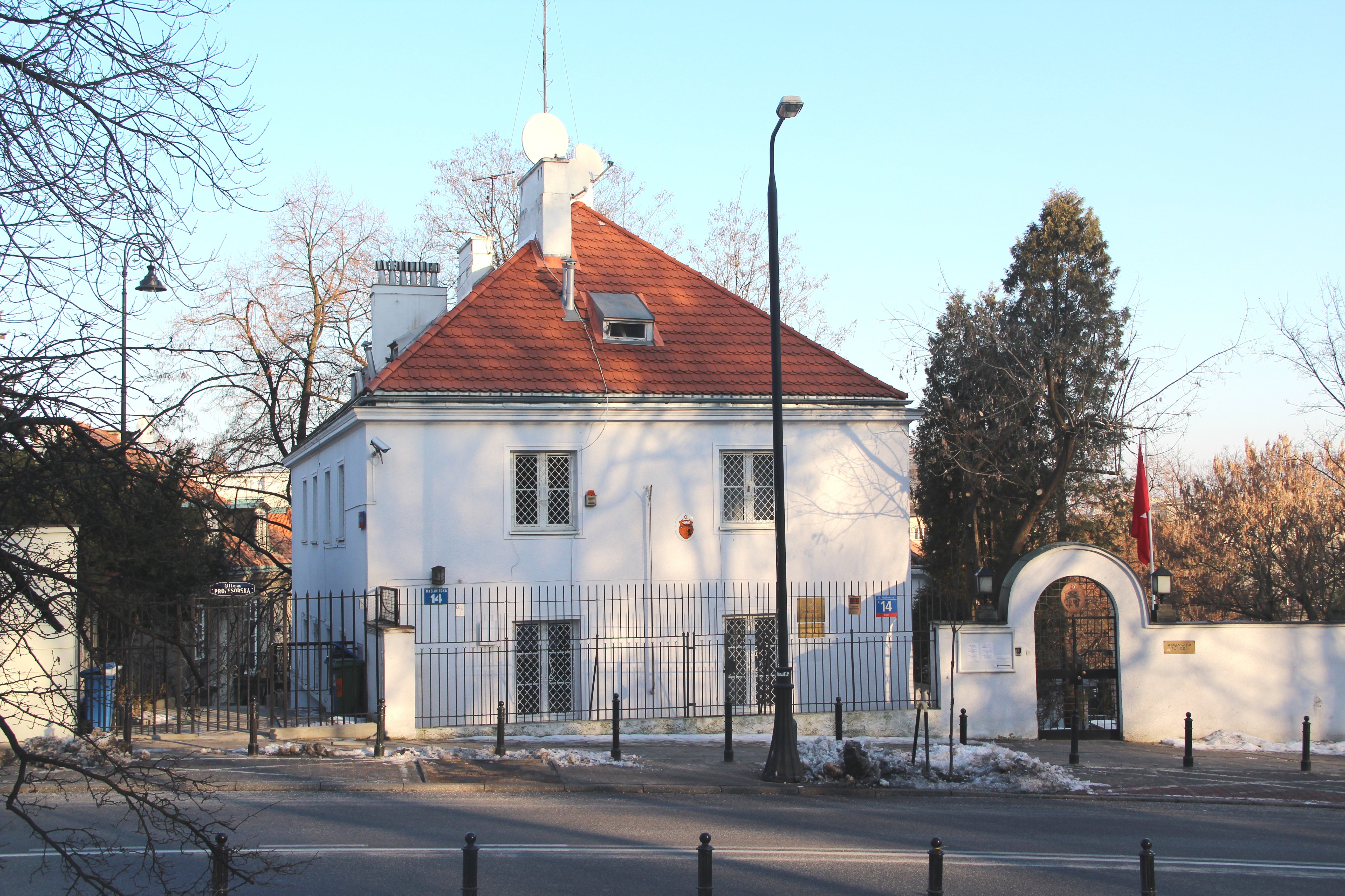 Warschau Botschaft Tunesien